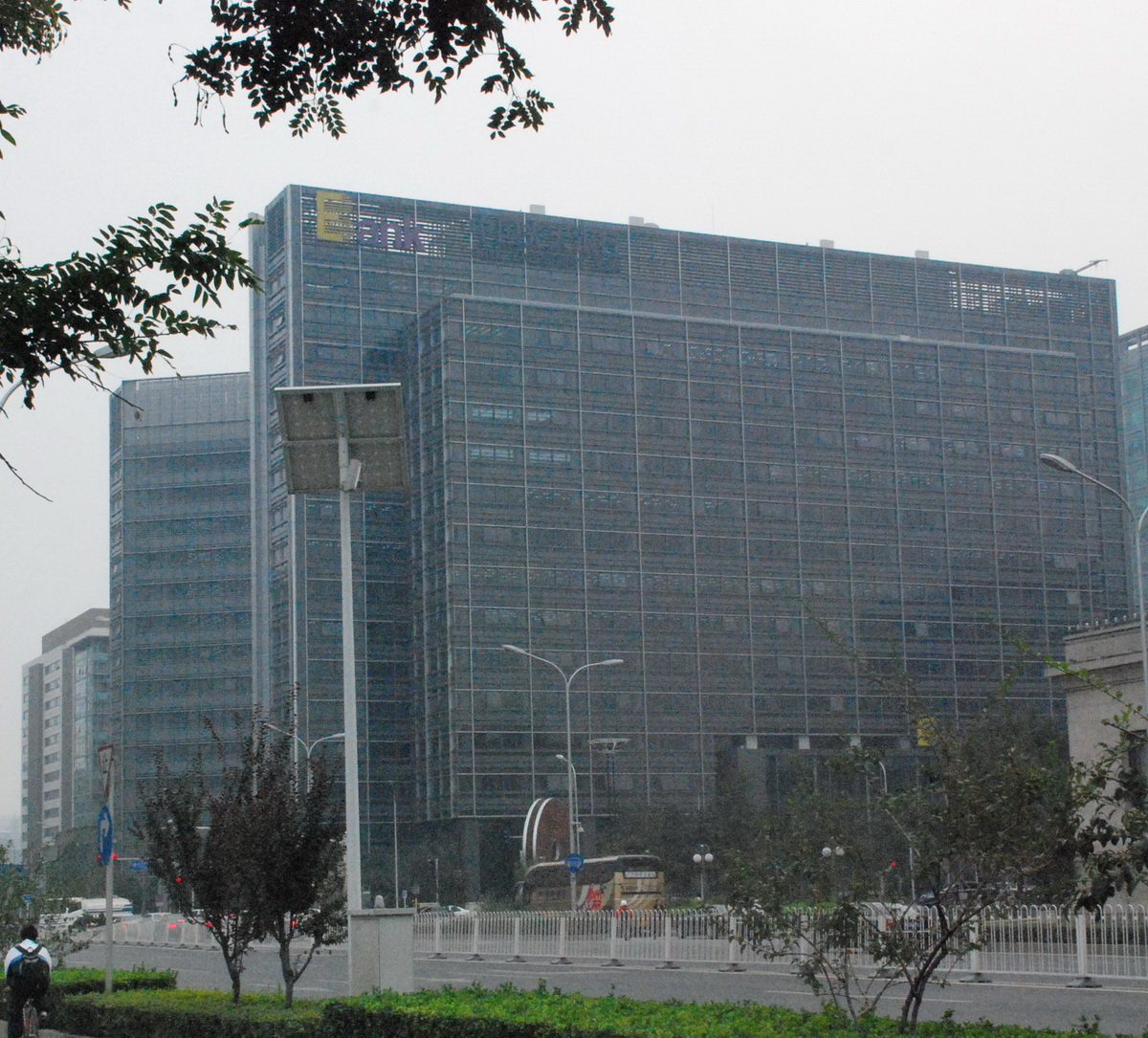 光大